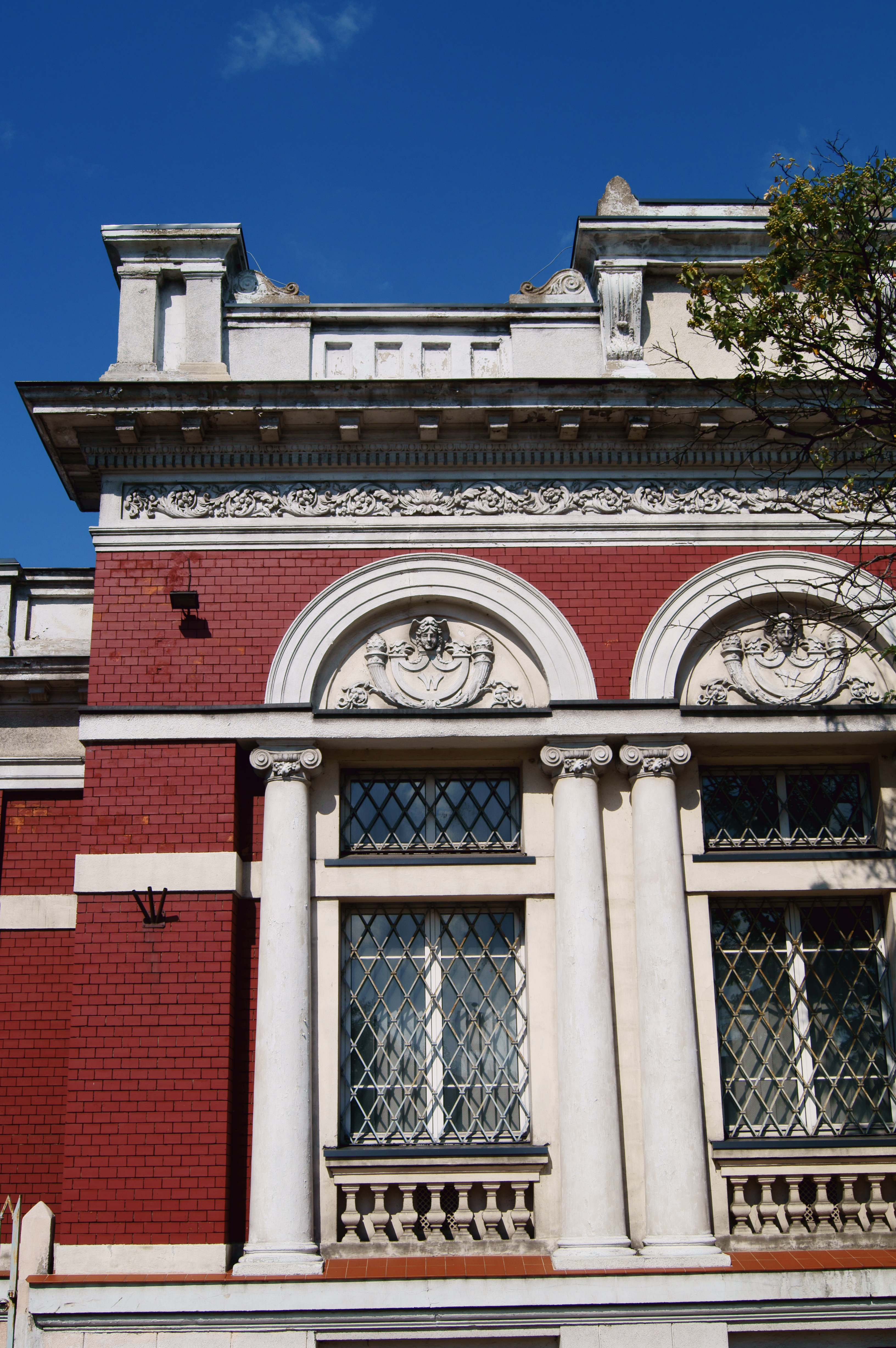 Bank Gospodarstwa Krajowego, 1911 Włocławek, ul. Żabia 2, miasto Włocławek